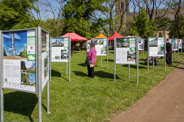 Zahájení výstavy Má vlast cestami proměn na Vyšehradě.